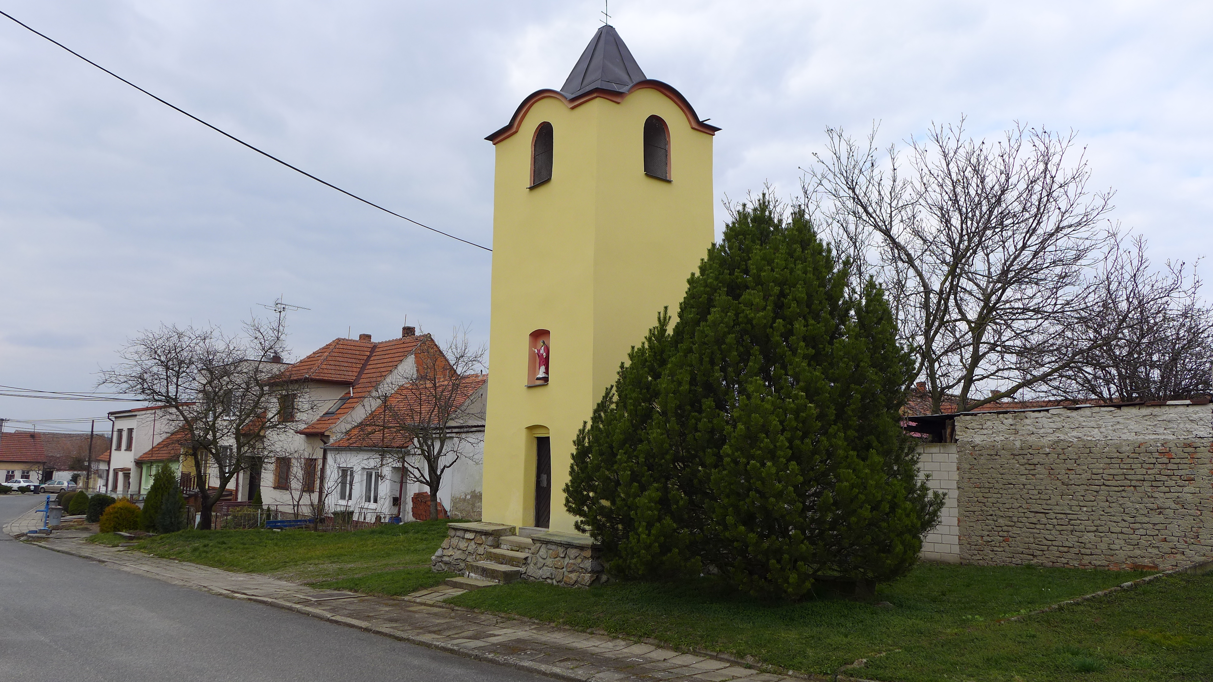 Zvonice, Lesonice (okres Znojmo).